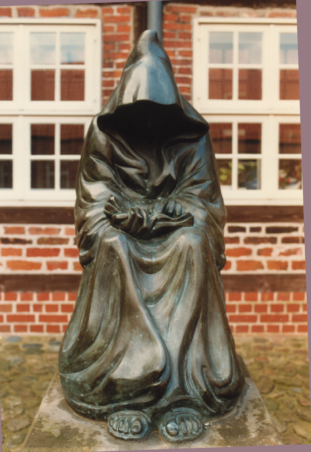 Lesender Mönch, Bronze-Plastik von Carsten Eggers